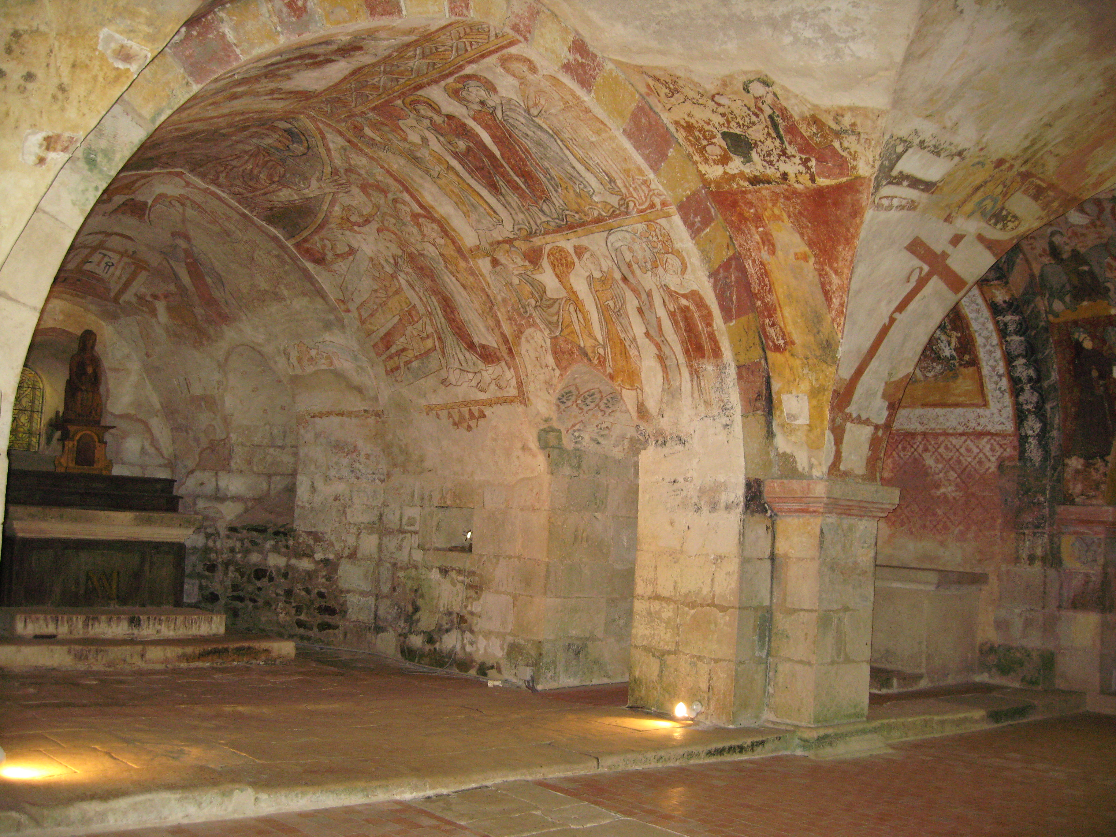 Crypte de l'église de Gargilesse (Indre)